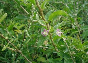 Lycium barbarum